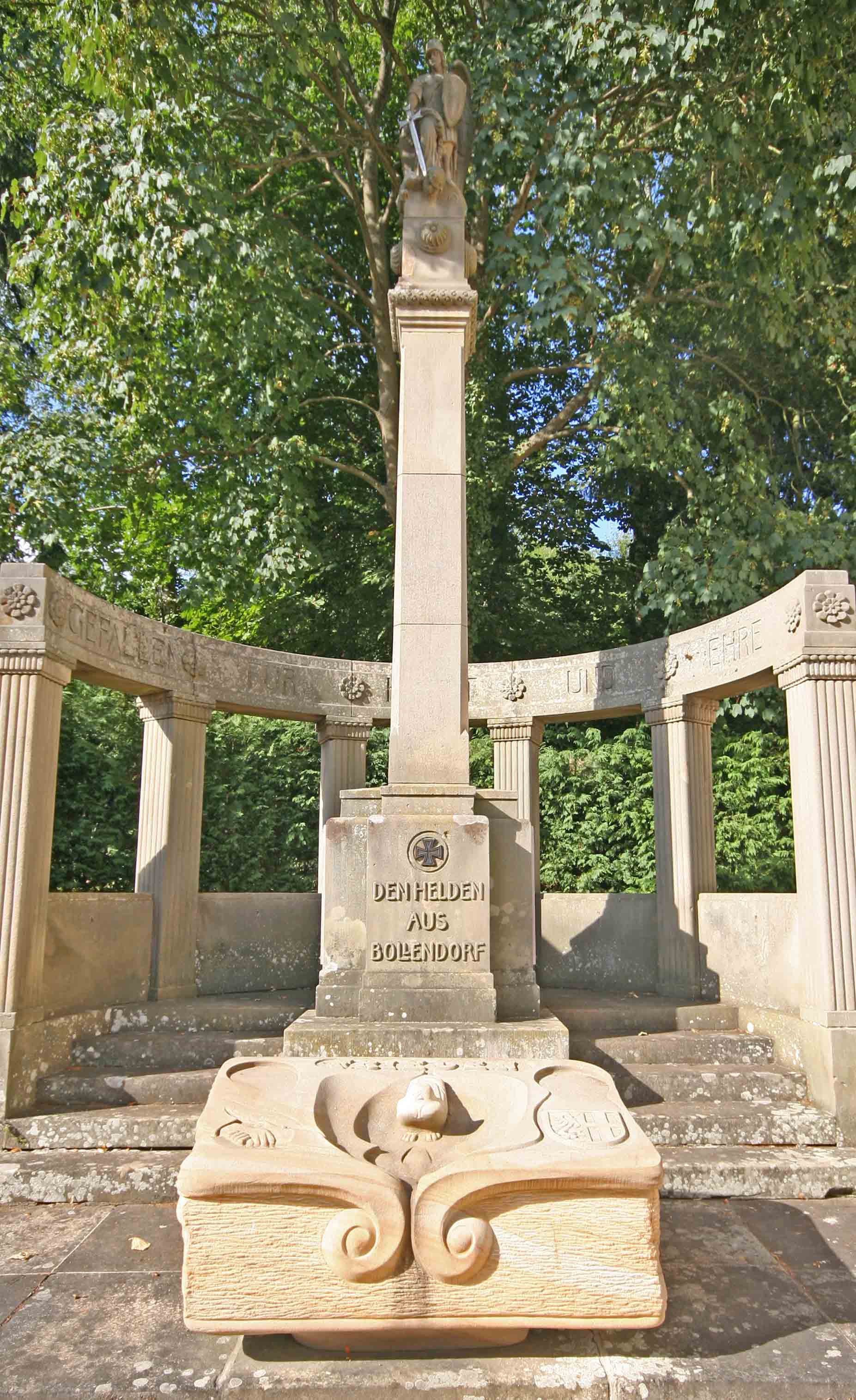 Sujet:Helde-Monument zu Bollendorf